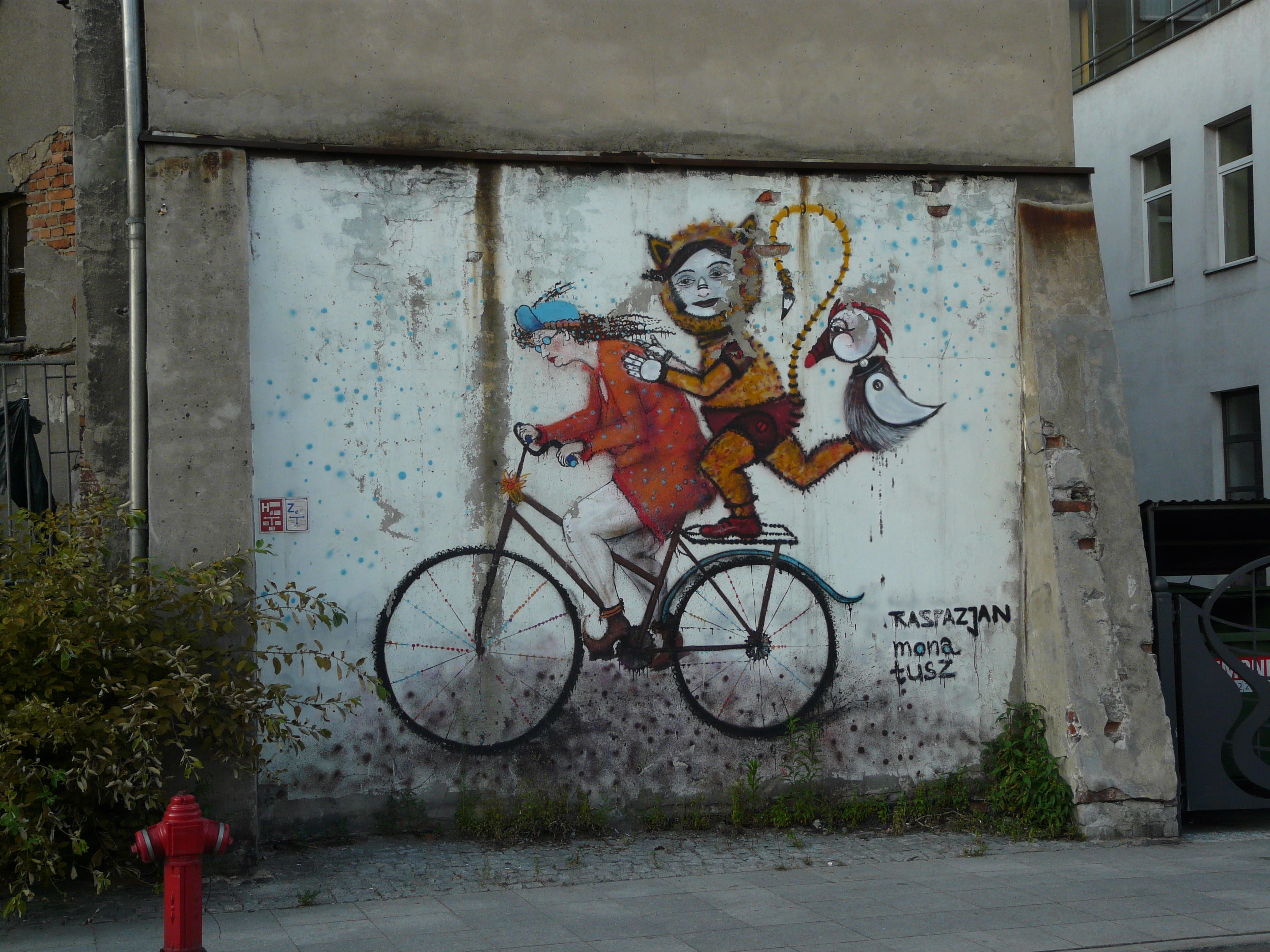 Mural w Katowicach, autorzy: Mona Tusz i Jan Michał Raspazjan.